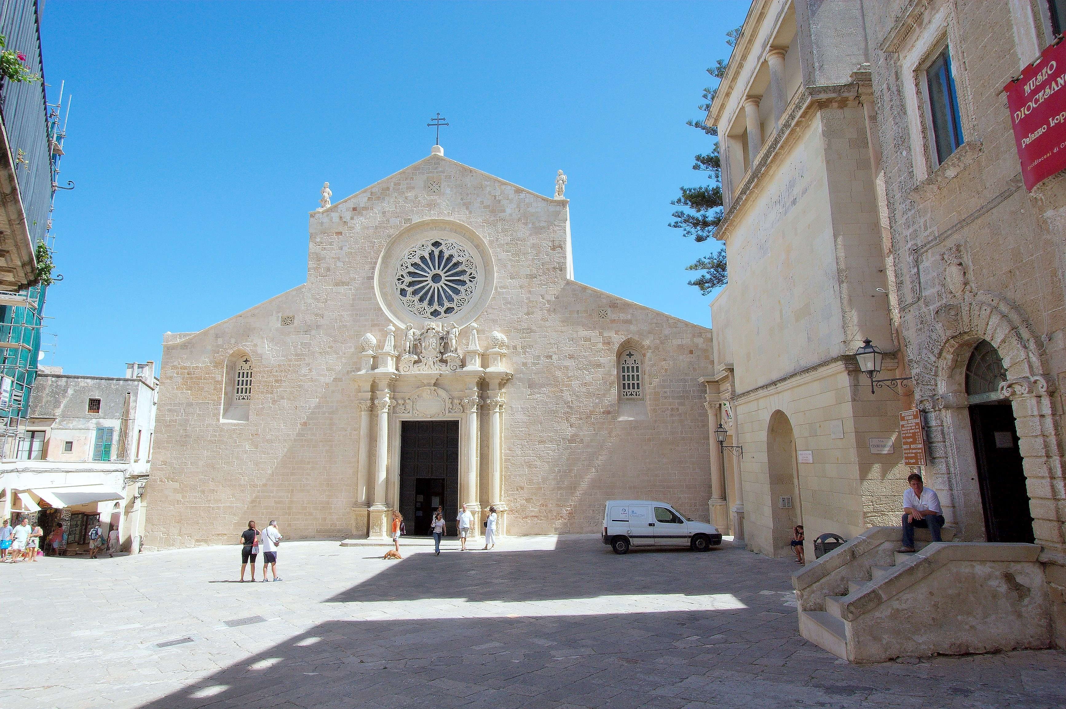 Kathedrale. Kathedrale, Otranto.